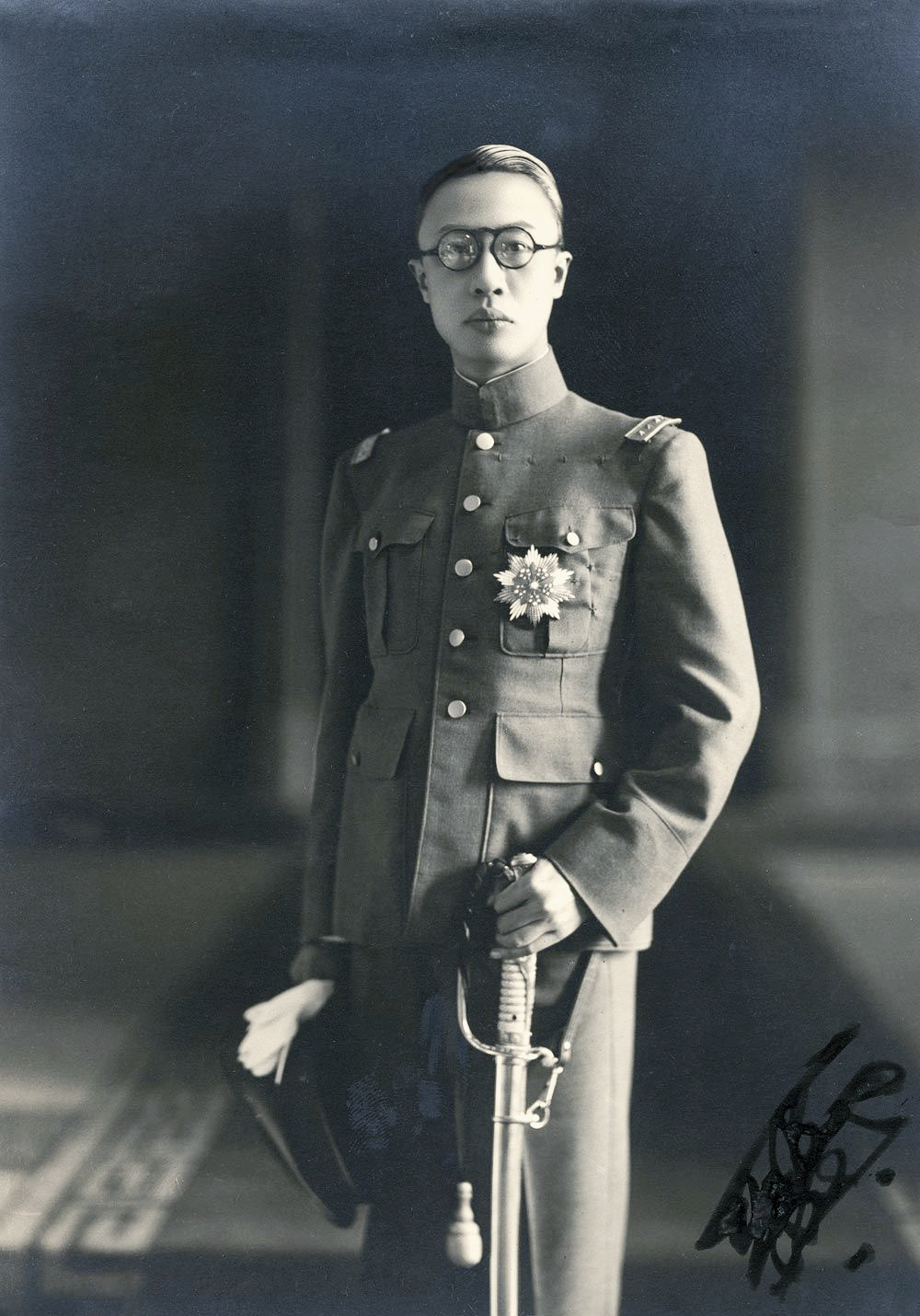 中文（台灣）: 滿洲國時期溥儀